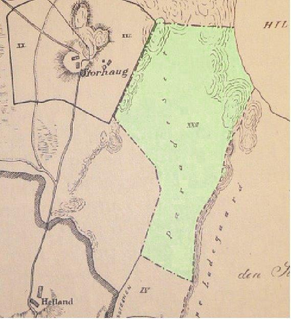 Fargelagt kartutsnitt over Paradis på kartet over Hetland prestegård fra 1840-tallet (1843?).